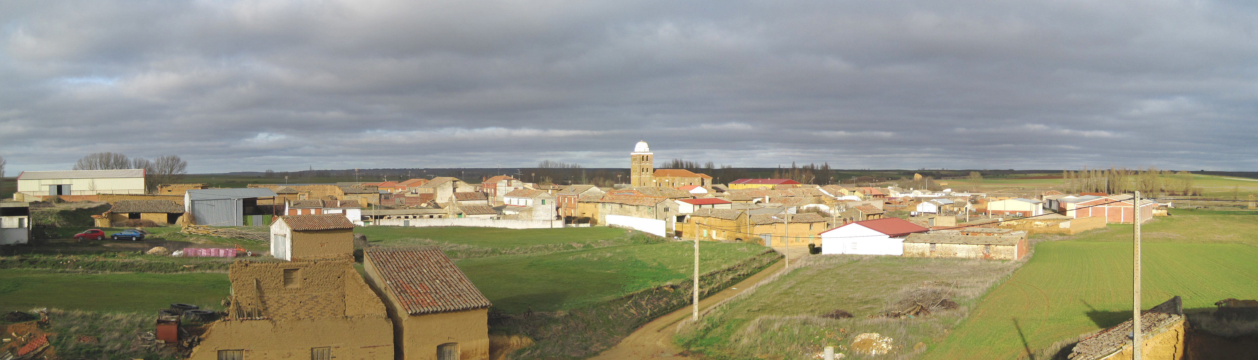 Vista panorámica de San Román de la Cuba (Palencia, España).